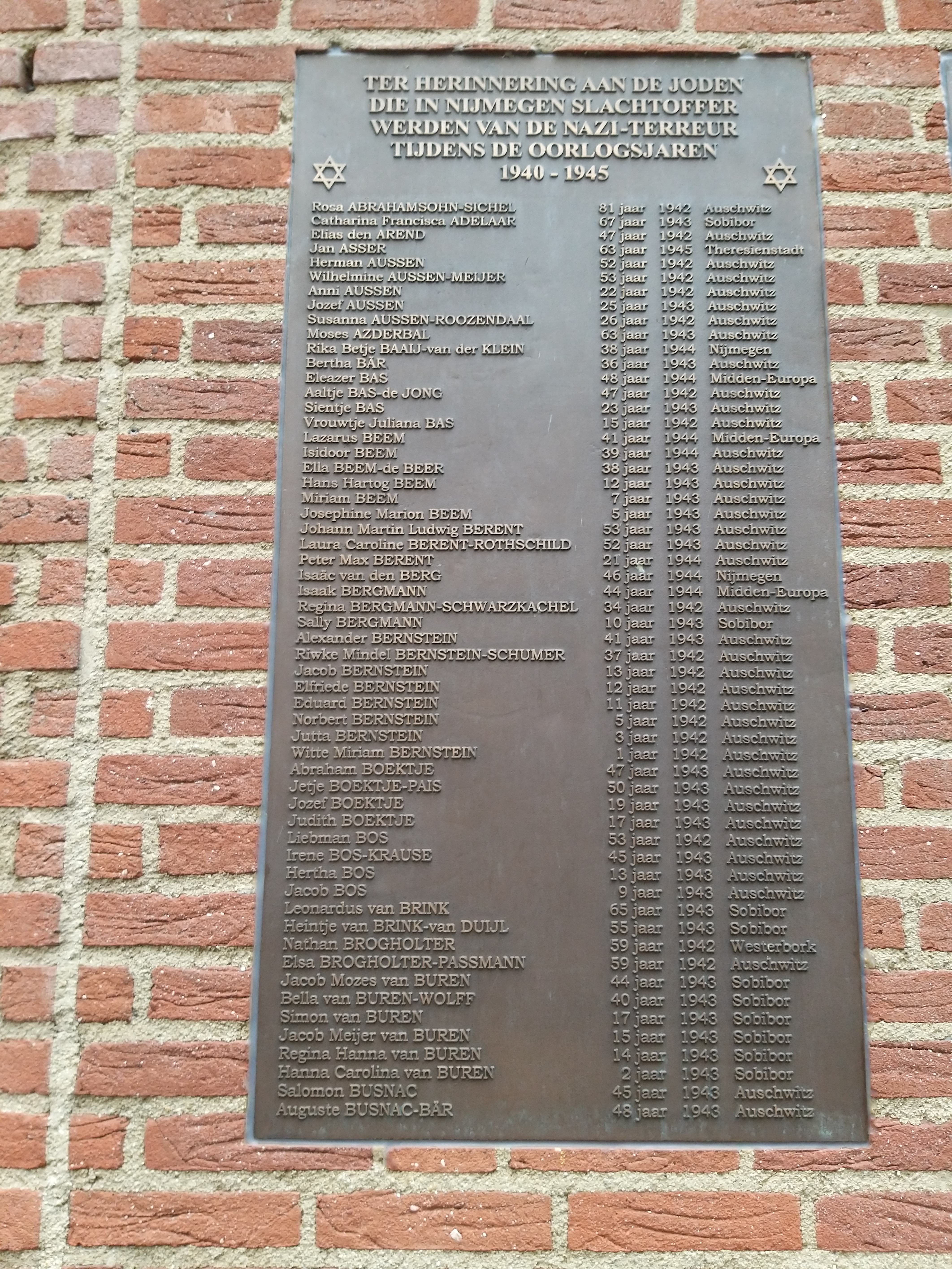 Een van de zeven bronzen plaquettes